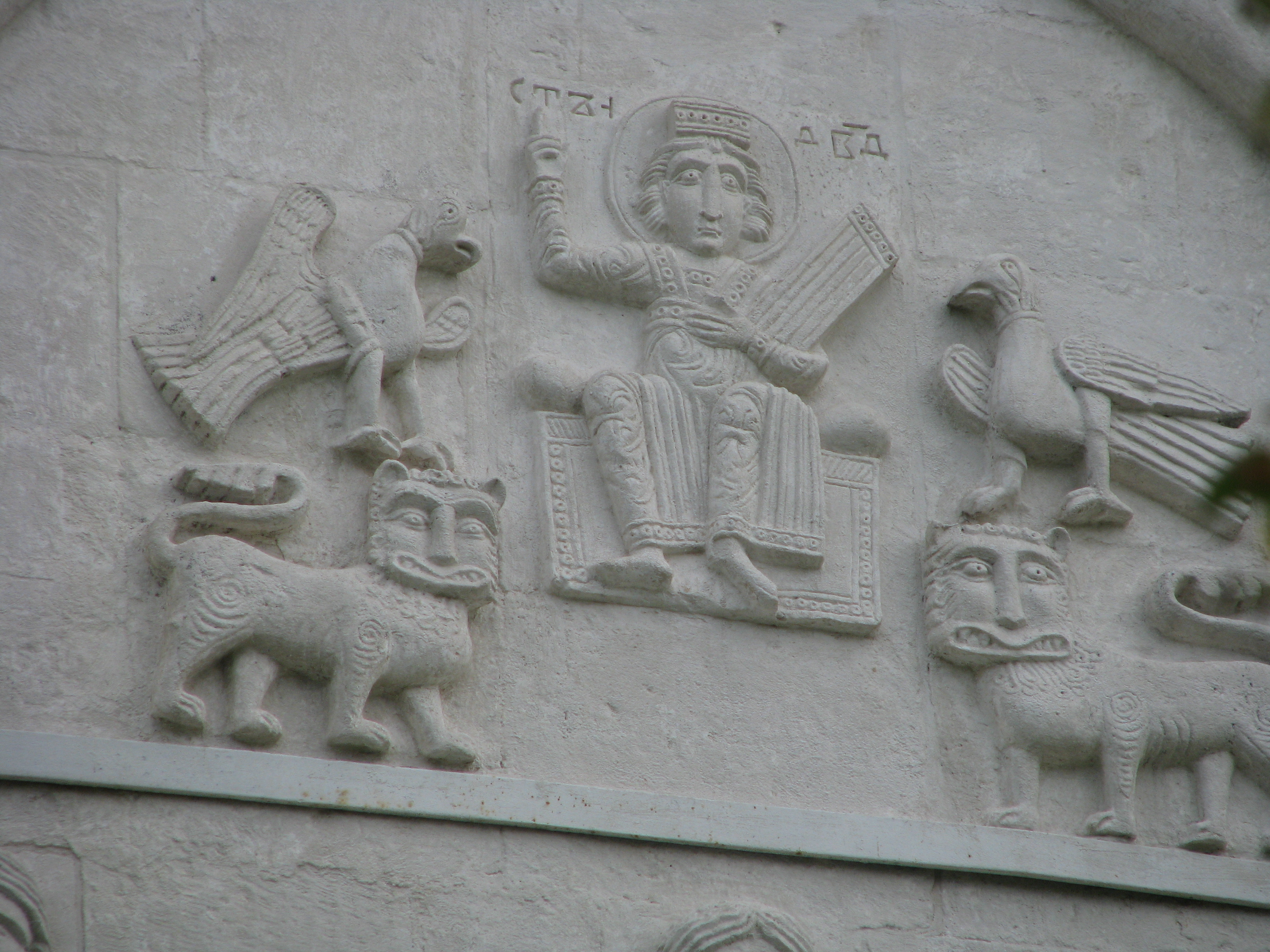 Храм Покрова на Нерли. Рельефы. Резьба, белый камень.